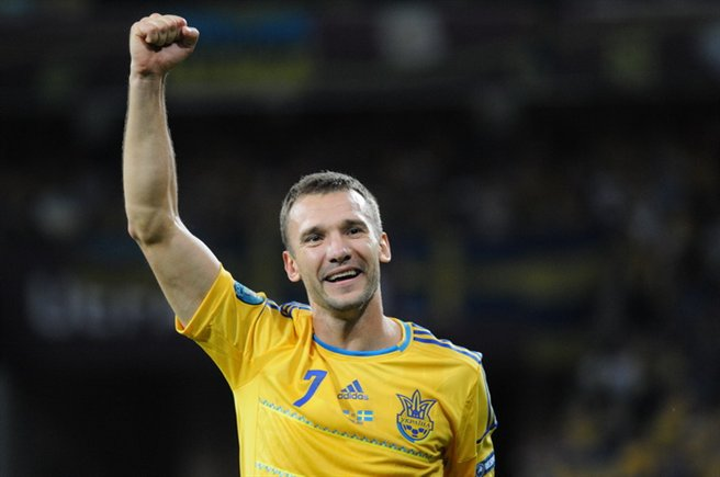 Andriy Shevchenko at the Euro 2012 match against Sweden